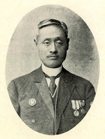 Bân-lâm-gú: 葉宗祺 Ia̍p Chong-kî